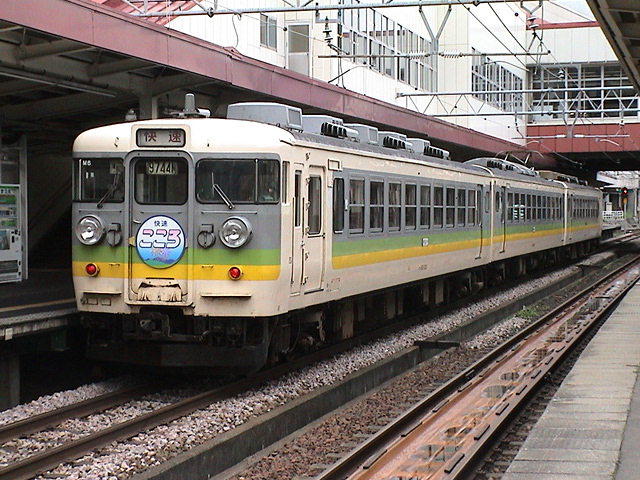 快速「こころ」に充当された国鉄165系電車